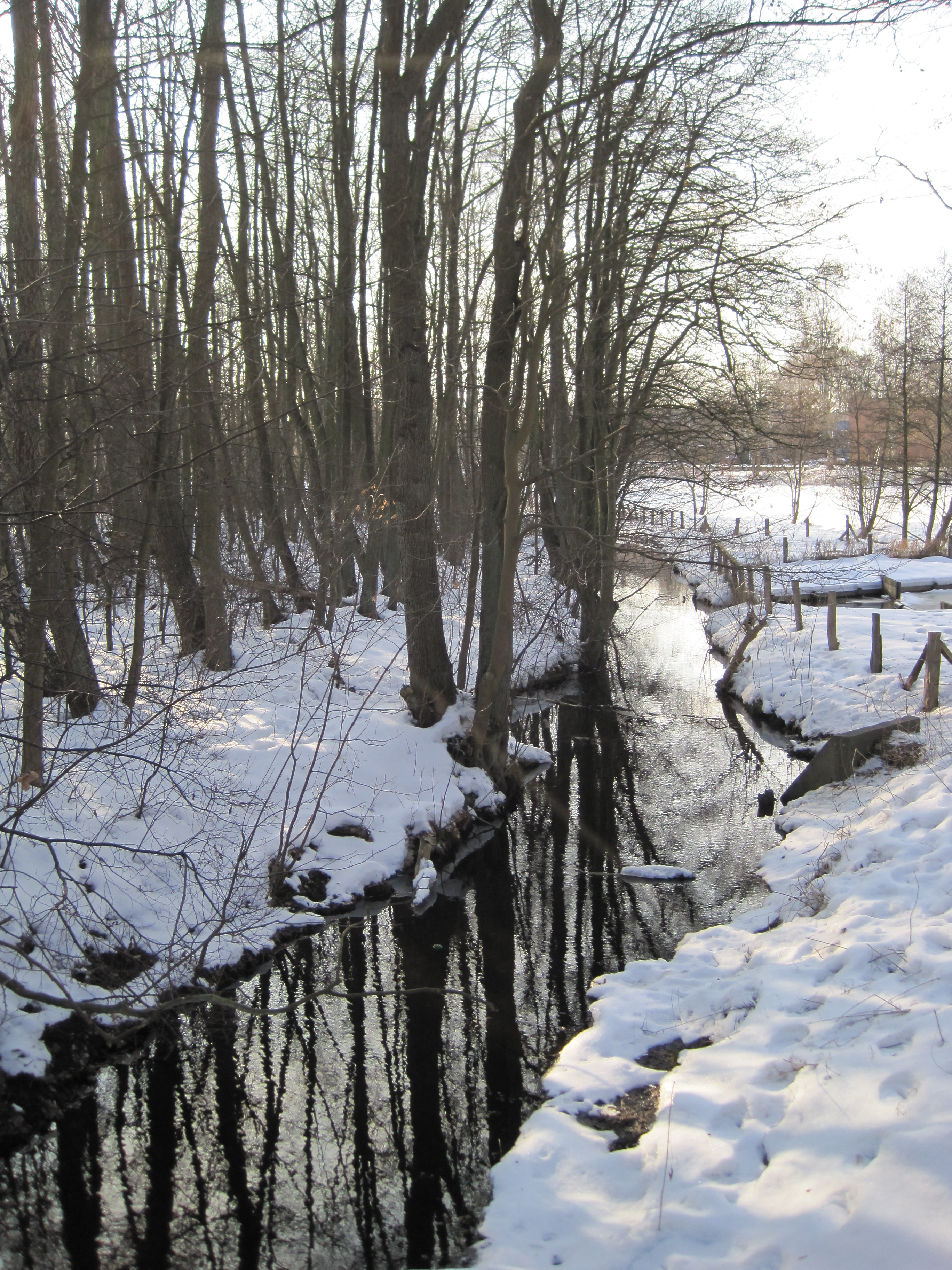 Lübecker Landgraben von der Brücke an der Brandenbaumer Landstraße Richtung Süden.